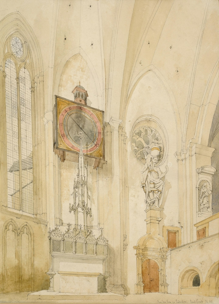 Aus dem Dom zu Paderbornlabel QS:Lde,"Aus dem Dom zu Paderborn"